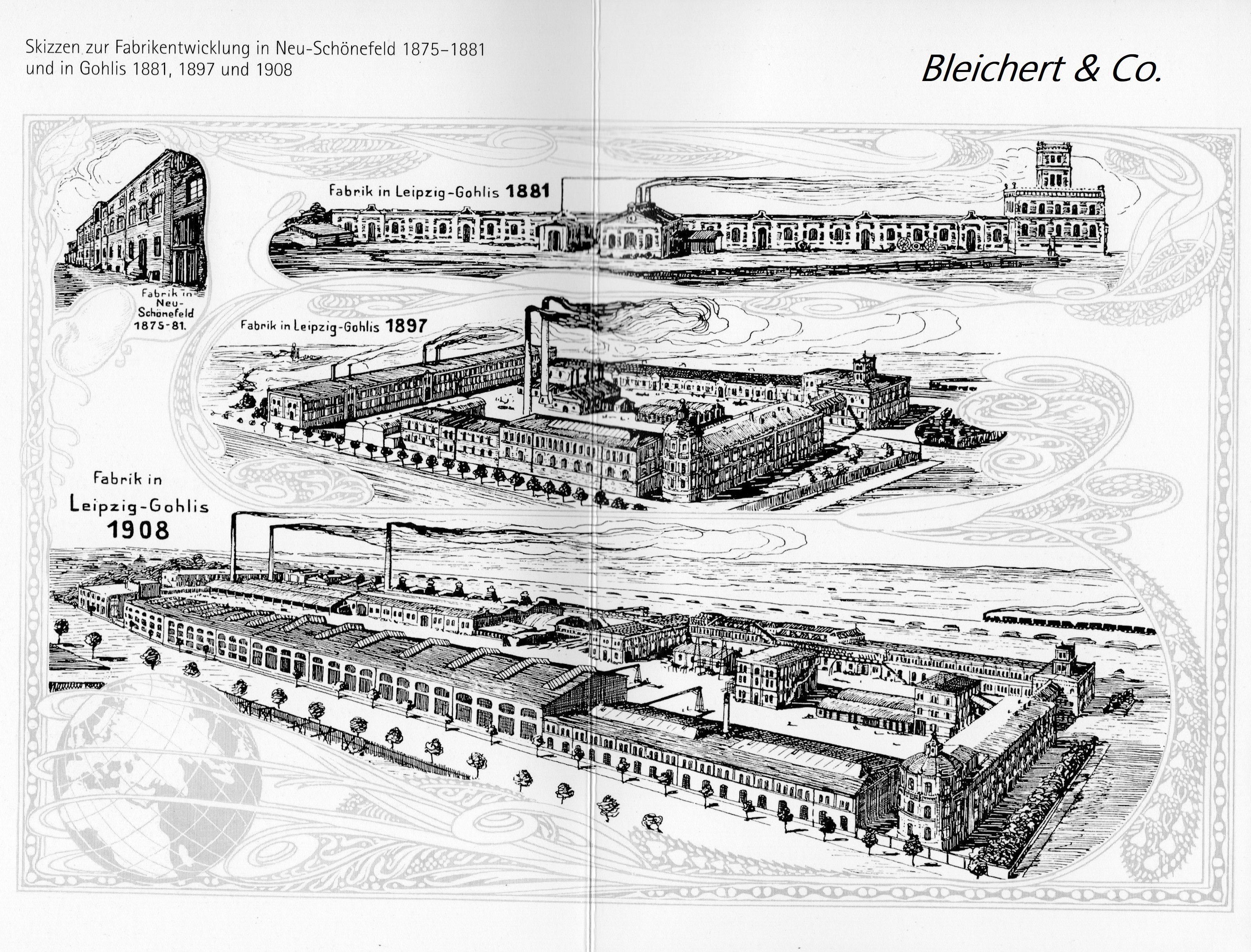 Plan Bleichert Fabrikgelände 1899 - 1908 in Leipzig-Gohlis, Sachsen, Deutschland